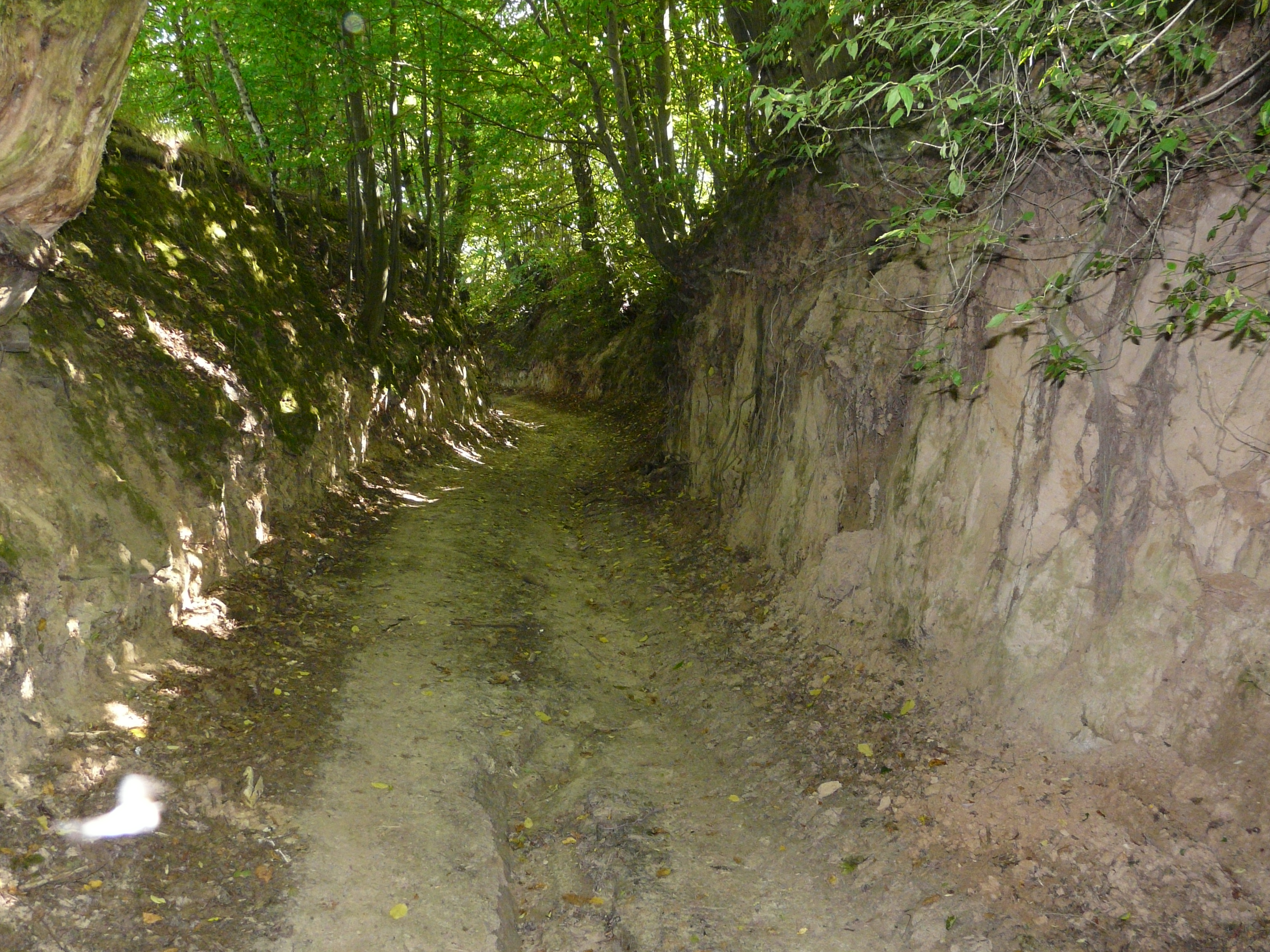 Wąwóz lessowy w lesie między Pniakami a Kraśnicznynem.